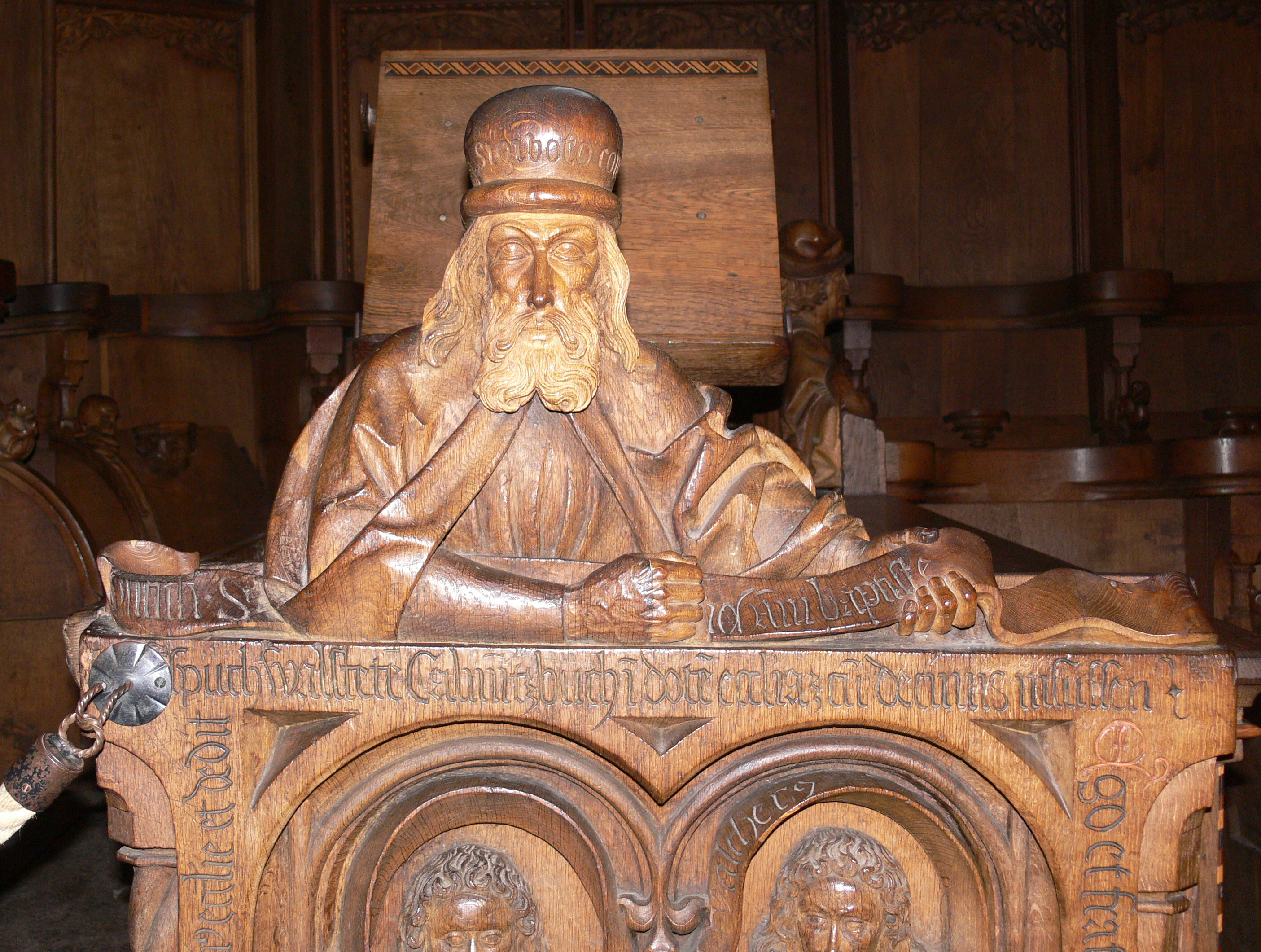 Kloster Blaubeuren, Klosterkirche, Chorraum Chorgestühl von Jörg Syrlin d. J., 1493 Stifterfigur Graf Sigibot von Tübingen (bzw. von Ruck), Bruder von Anselm von Tübingen und Hugo III. von Tübingen („Ego contuli St. Johanni Baptiste ... Sussen“ [Seißen])